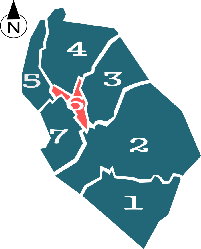 Mapa Ciudad de La Paz